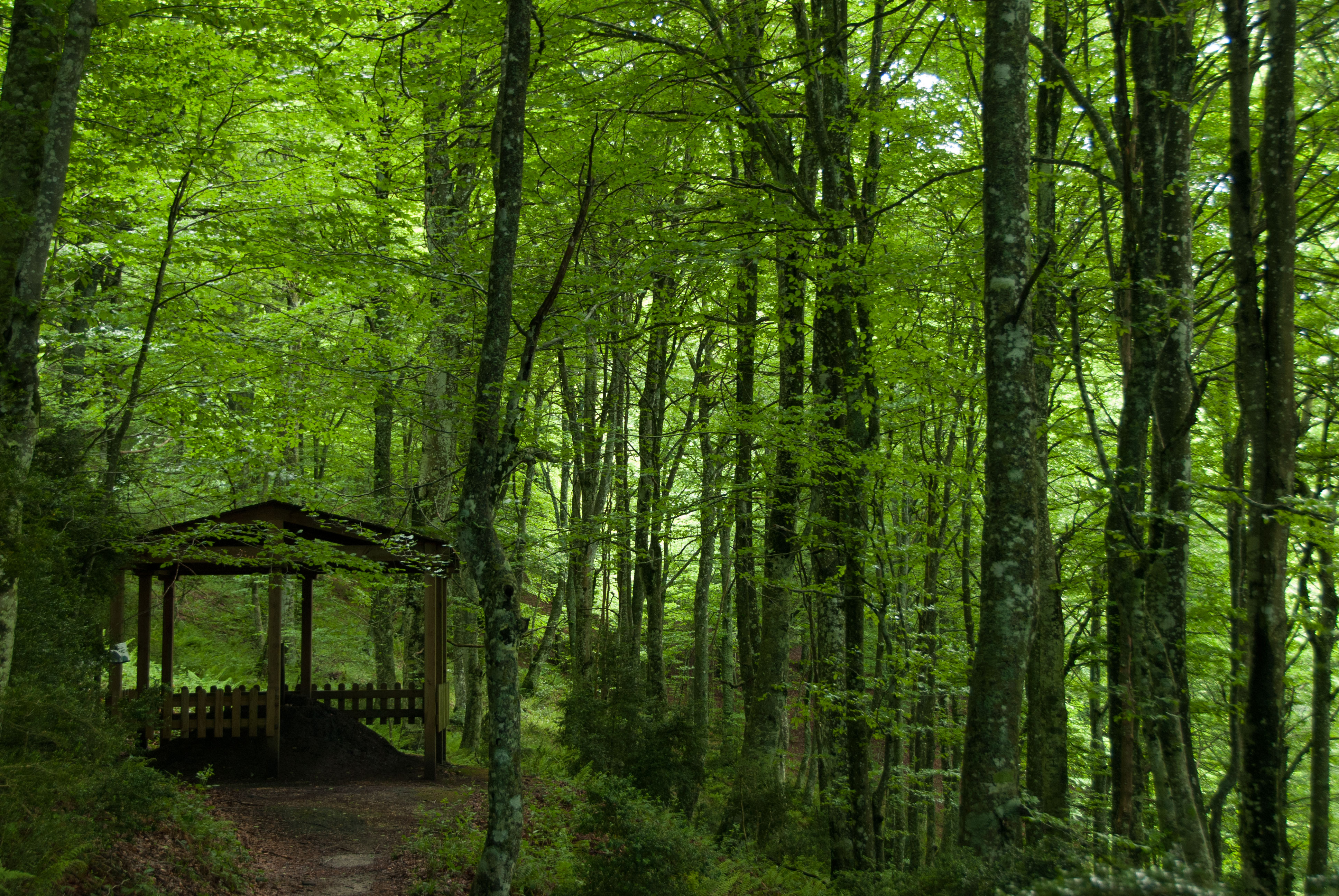 Recreación de carbonera en la vertiente norte de la Sierra de Cantabria hacia Lagran This is a photography of a Site of Community Importance in Spain with the ID: ES0000062. Natura2000 entry, EEA entry